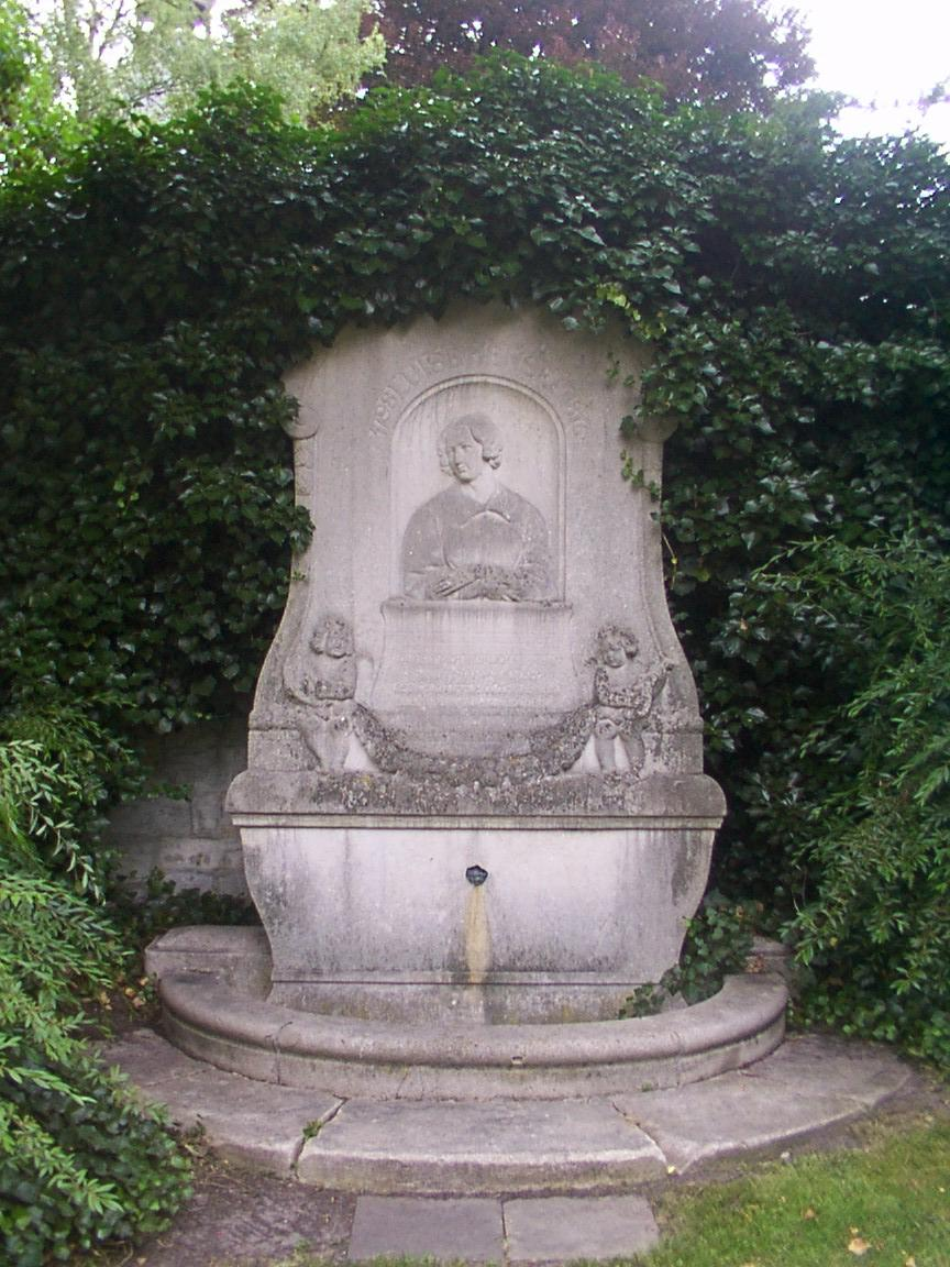 Paderborn: Denkmal der Luise Hensel am Liboriberg vor der Jesuitenmauer Inschrift: 1798 Luise Hensel 1876 QUAELT DICH HEIMLICH SEHNEN UNVERSTANDNES WEH SPRICH ZU IHM MIT TRAENEN HERR DEIN WILL' GESCHEH This is a photograph of an architectural monument.